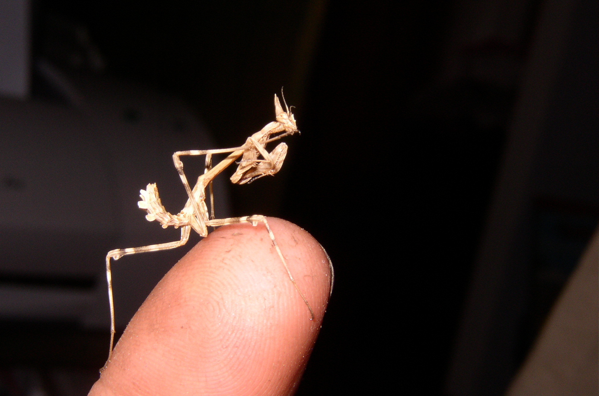 Juvenile Empusa pennata